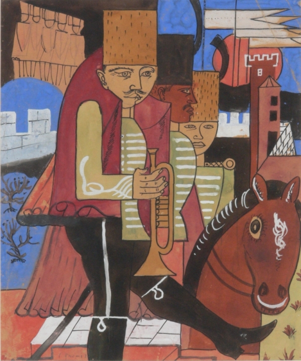 Titel: Husaren. Gouache. Maße: 400 x 330 mm.